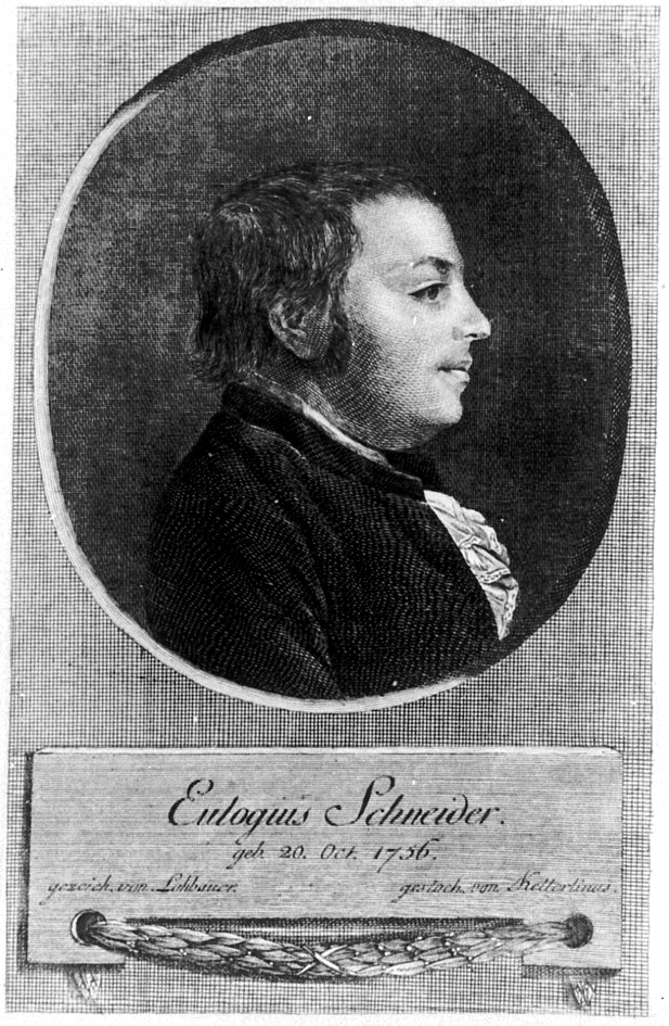 Eulogius Schneider. Kupferstich von Christian Wilhelm Ketterlinus nach Philipp Gottfried Lohbauer, 1790. Köln, Kölnisches Stadtmuseum, Inv.-Nr. G 9798a